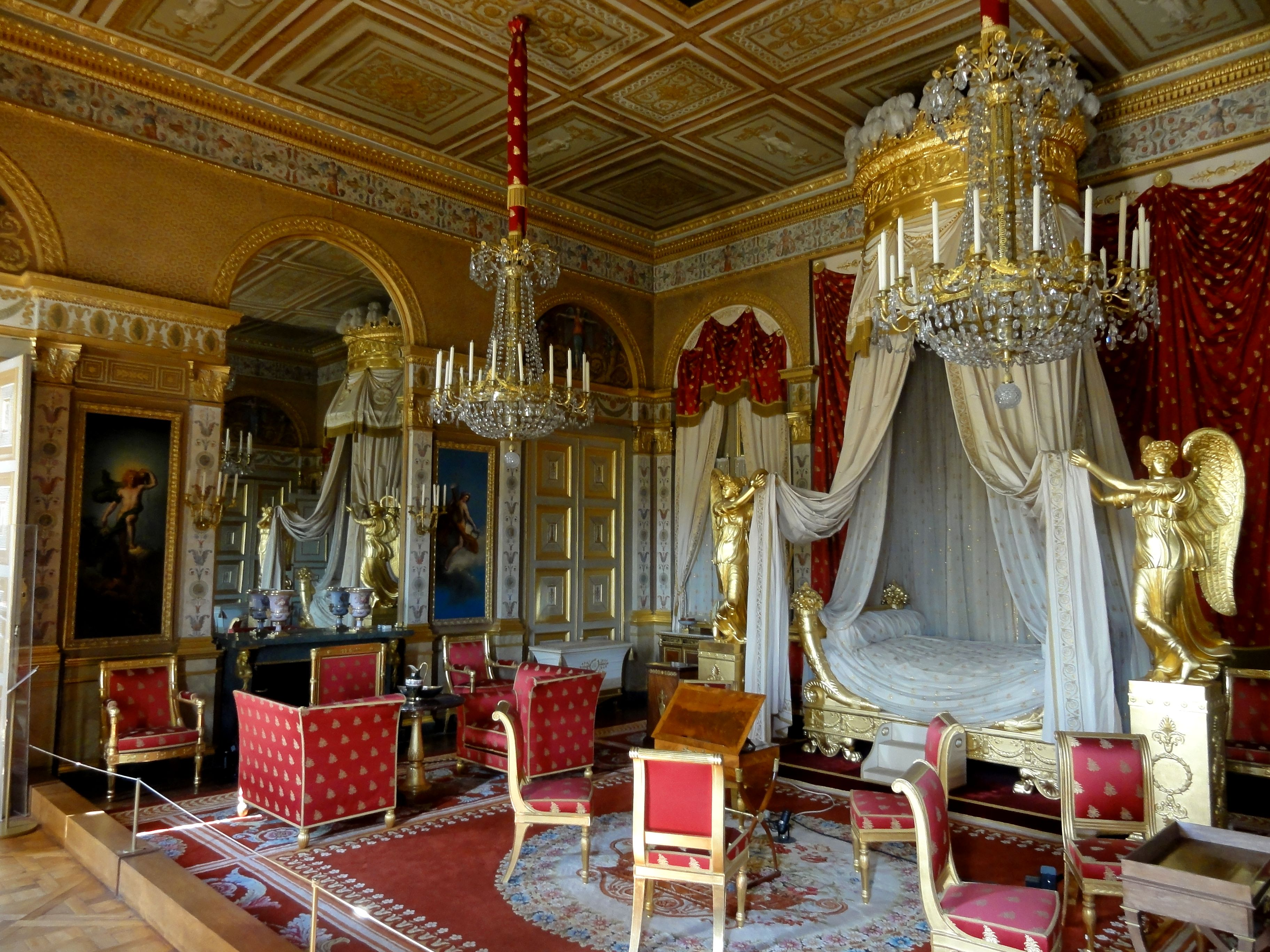 Chambre de l'Impératrice (Premier Empire).